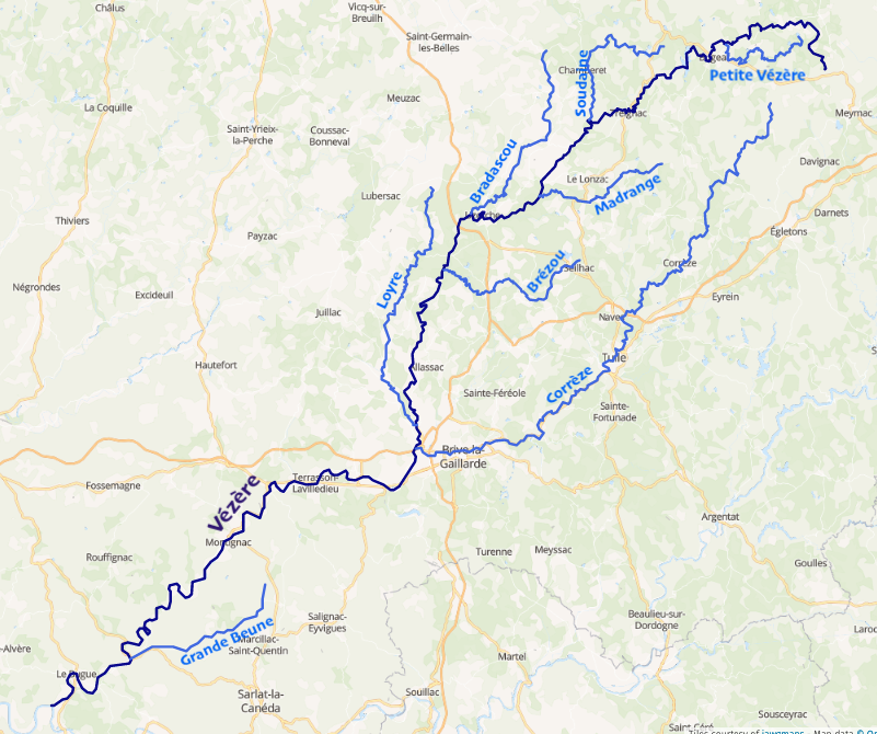 carte réalisée sur umap This map may be incomplete, and may contain errors. Don't rely solely on it for navigation.